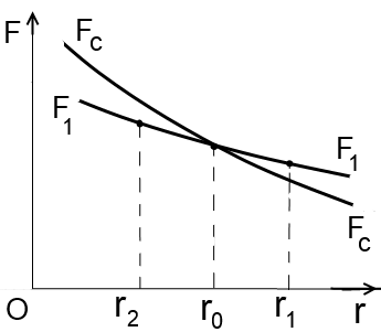 Betatron Lorentz force